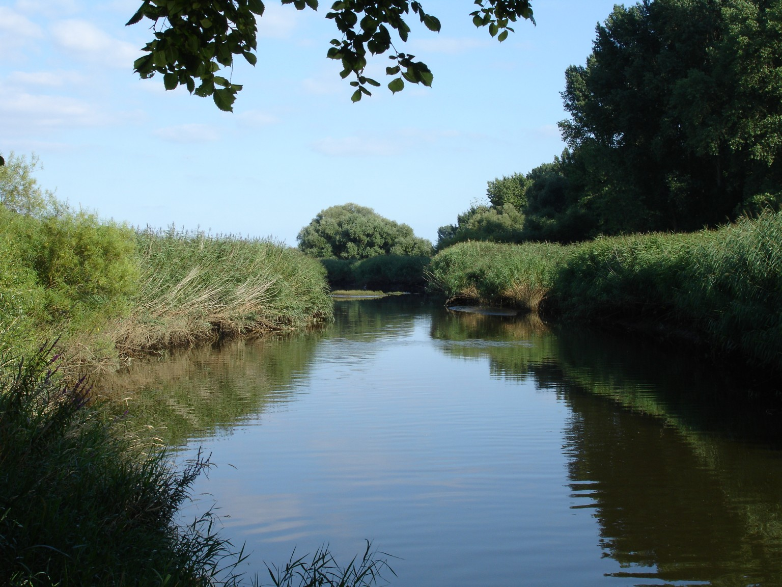 Heuckenlock an der Süderelbe